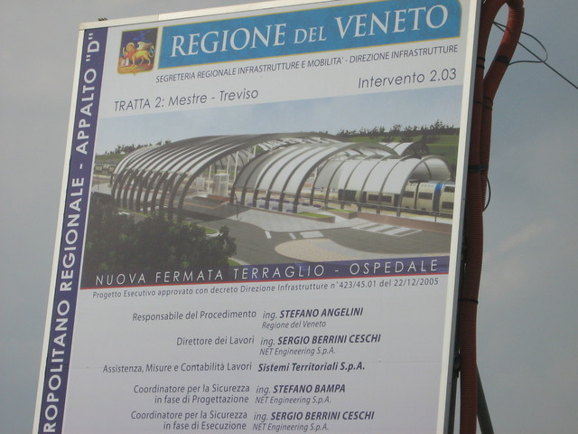 fs